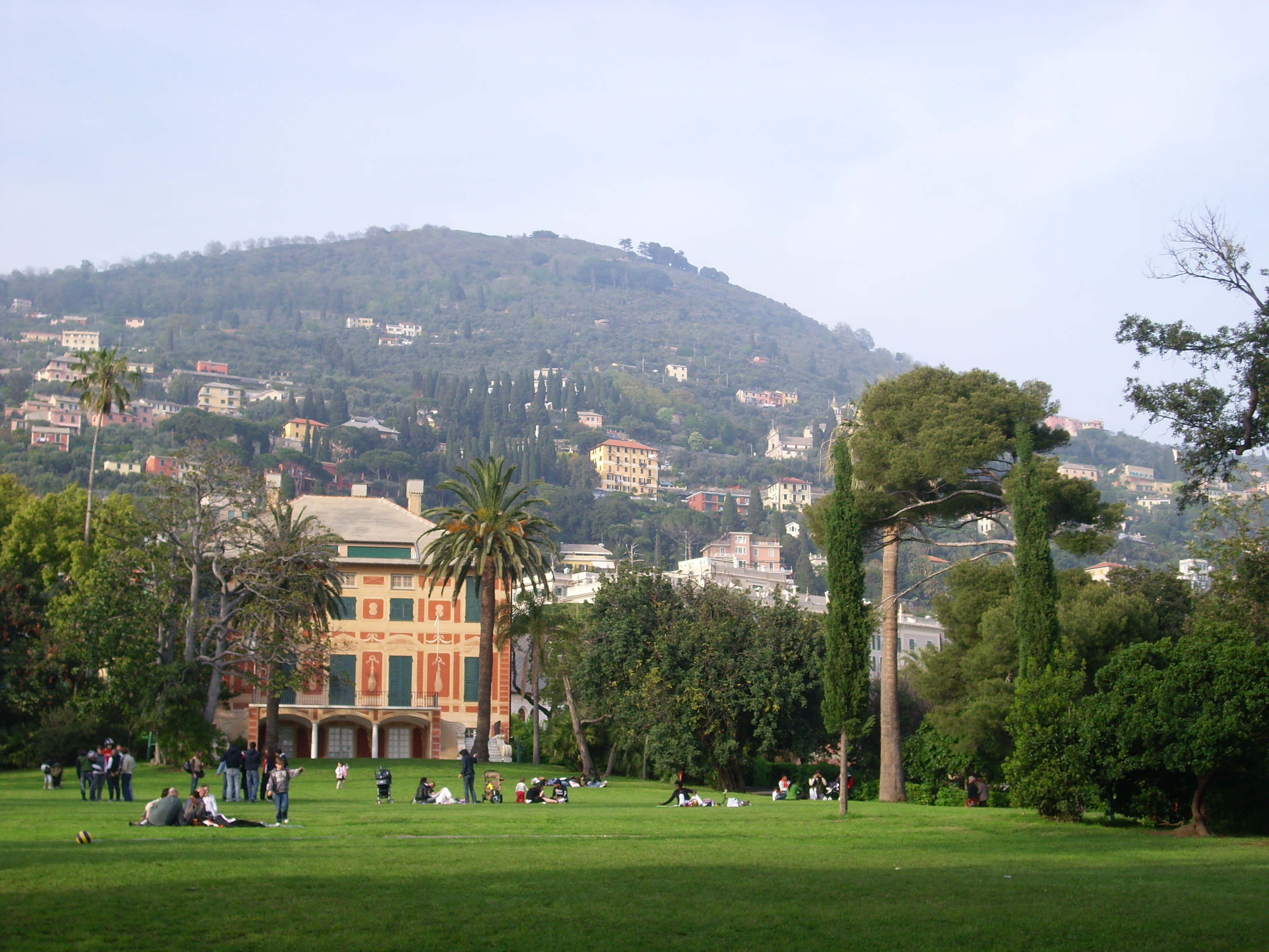 Villa Grimaldi Fassio, nei Parchi di Nervi, sede del museo Raccolte Frugone